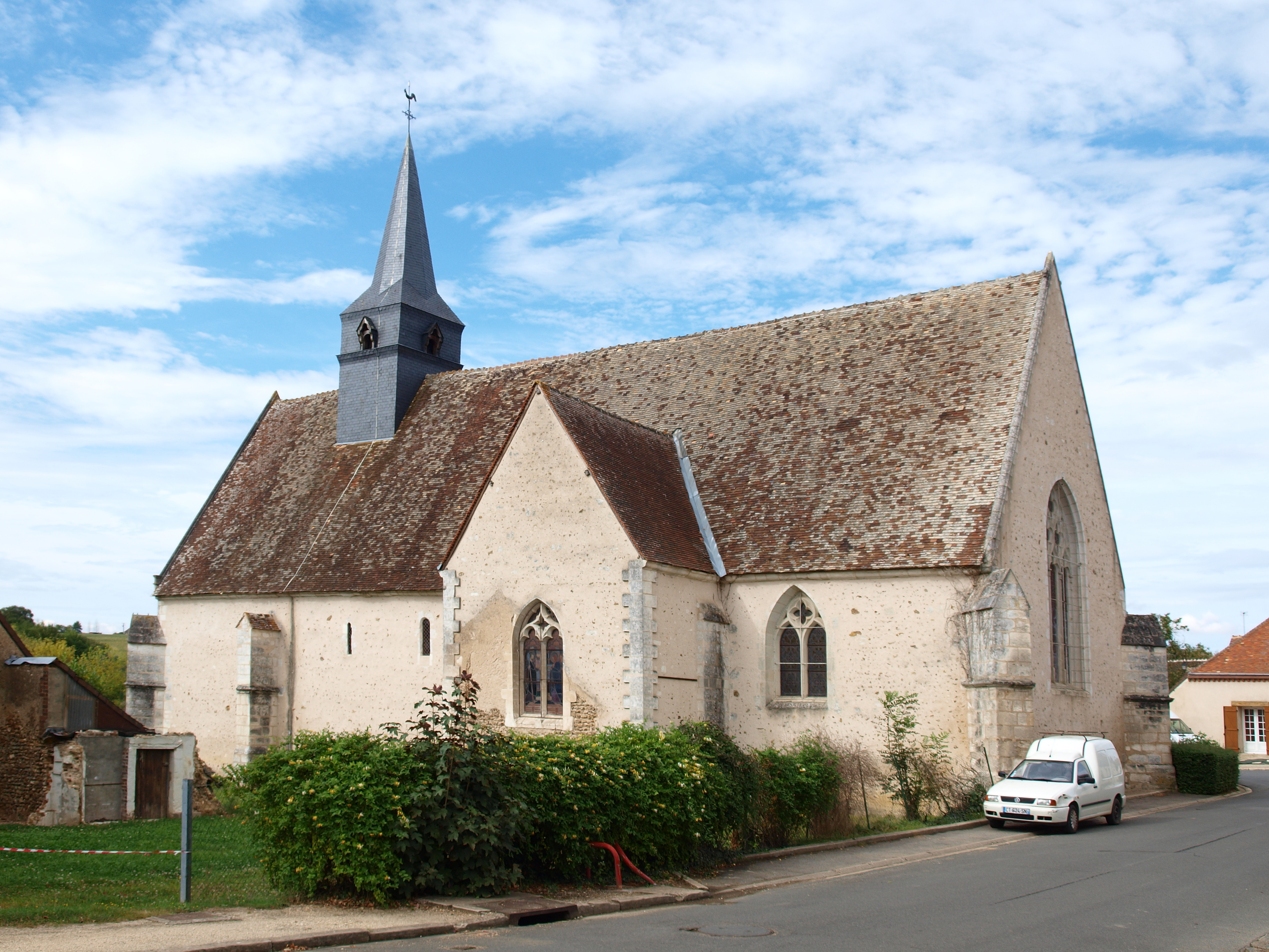 Busloup (Loir-et-Cher, France) ; église